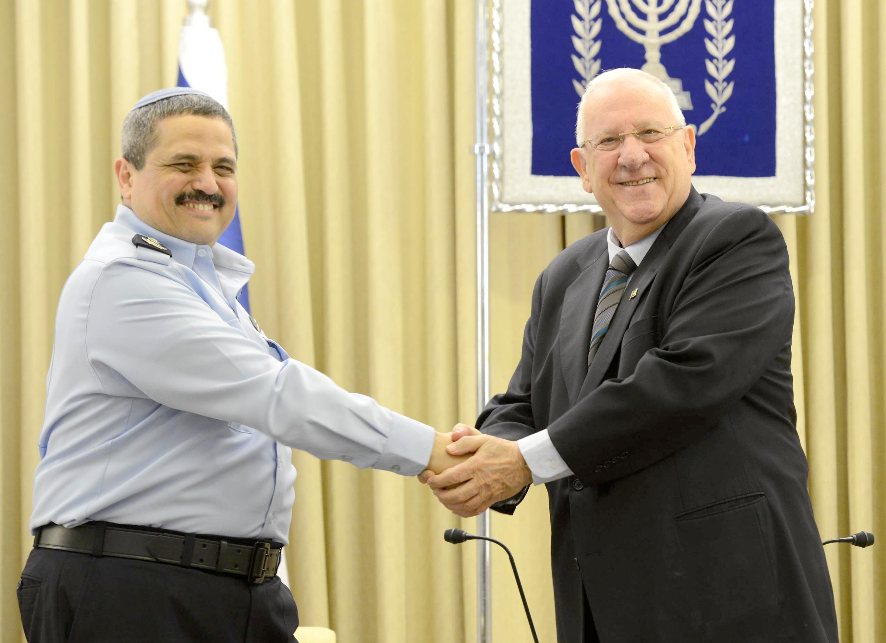 רב ניצב רוני אלשיך עם כניסתו לתפקיד מפכ״ל המשטרה בפגיה עם נשיא מדינת ישראל ראובן ריבלין